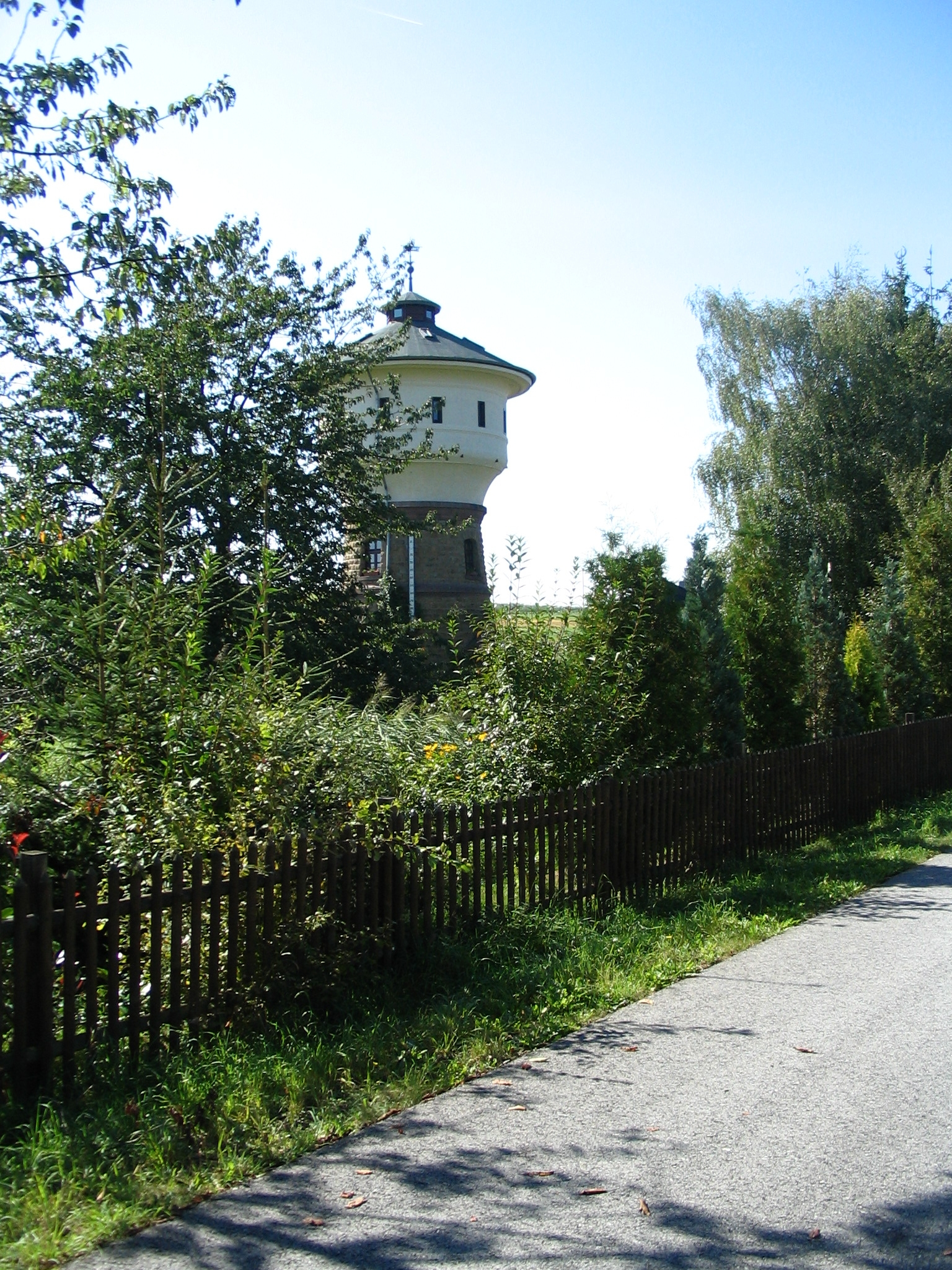 ehemaliger Wasserturm des stillgelegten Bahnhofs der Hunsrückbahn in Pfalzfeld (Hunsrück), Verbandsgemeinde Emmelshausen, Rheinland-Pfalz; inschriftlich datiert 1907; unter Denkmalschutz